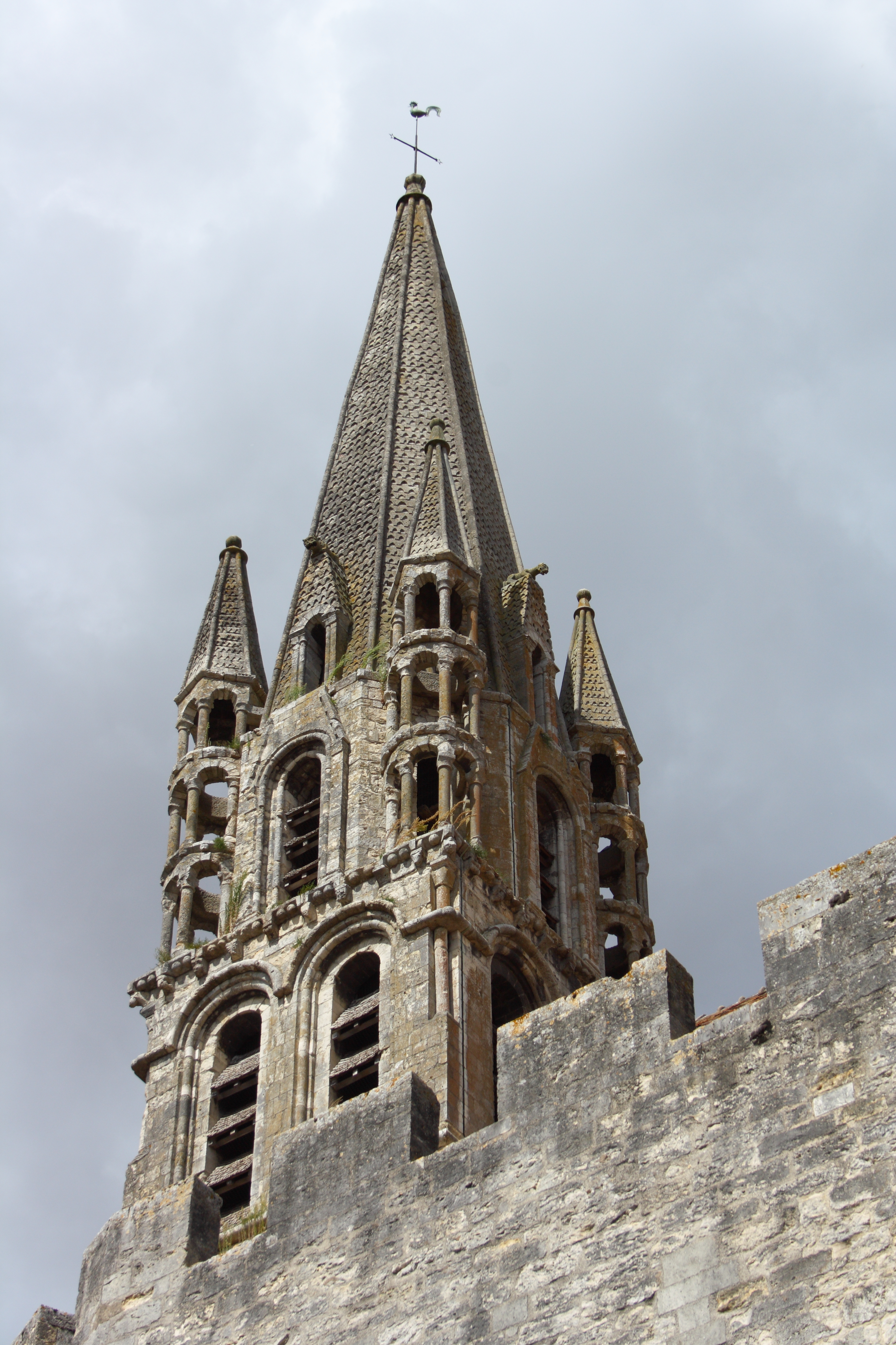 Katholische Pfarrkirche Notre-Dame-du-Fort in Étampes im Département Essonne in der Region Île-de-France (Frankreich), Glockenturm aus dem 12. Jahrhundert